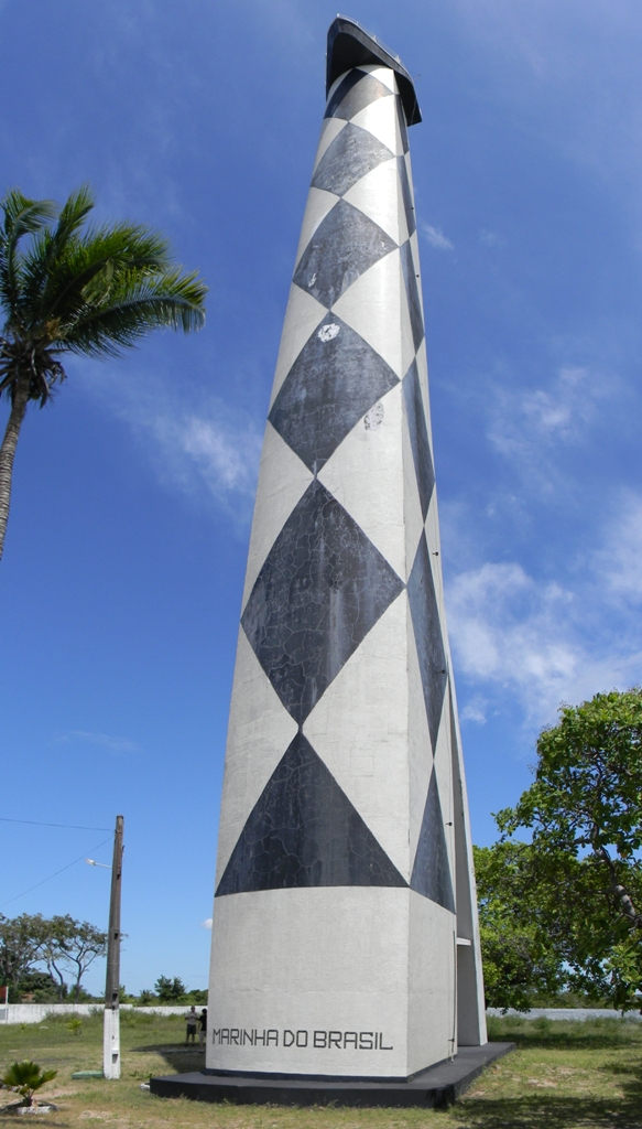 Farol Araçagi, estrada da Raposa, Maranhão, Brasil.